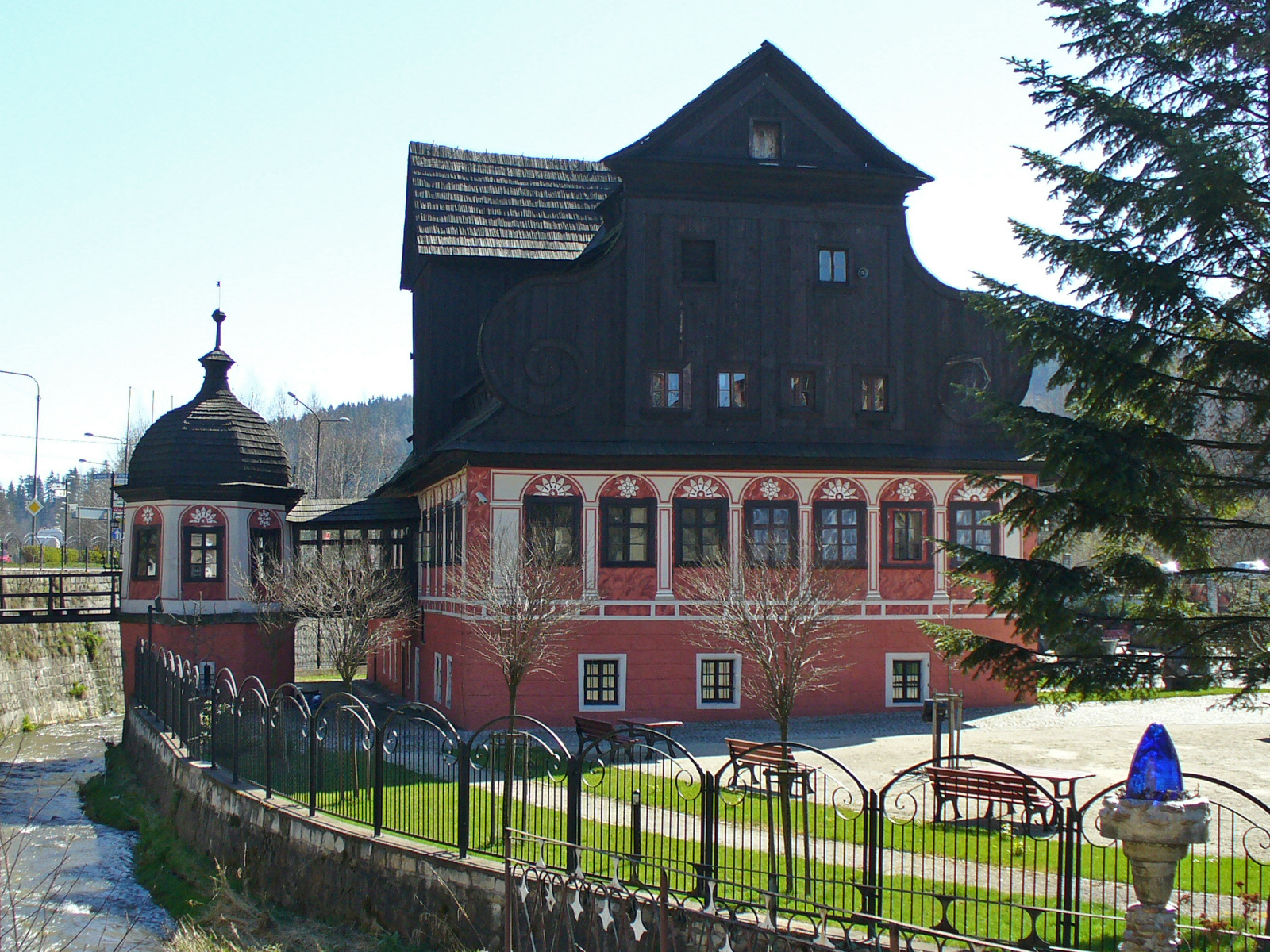 Muzeum Papiernictwa w Dusznikach Zdroju